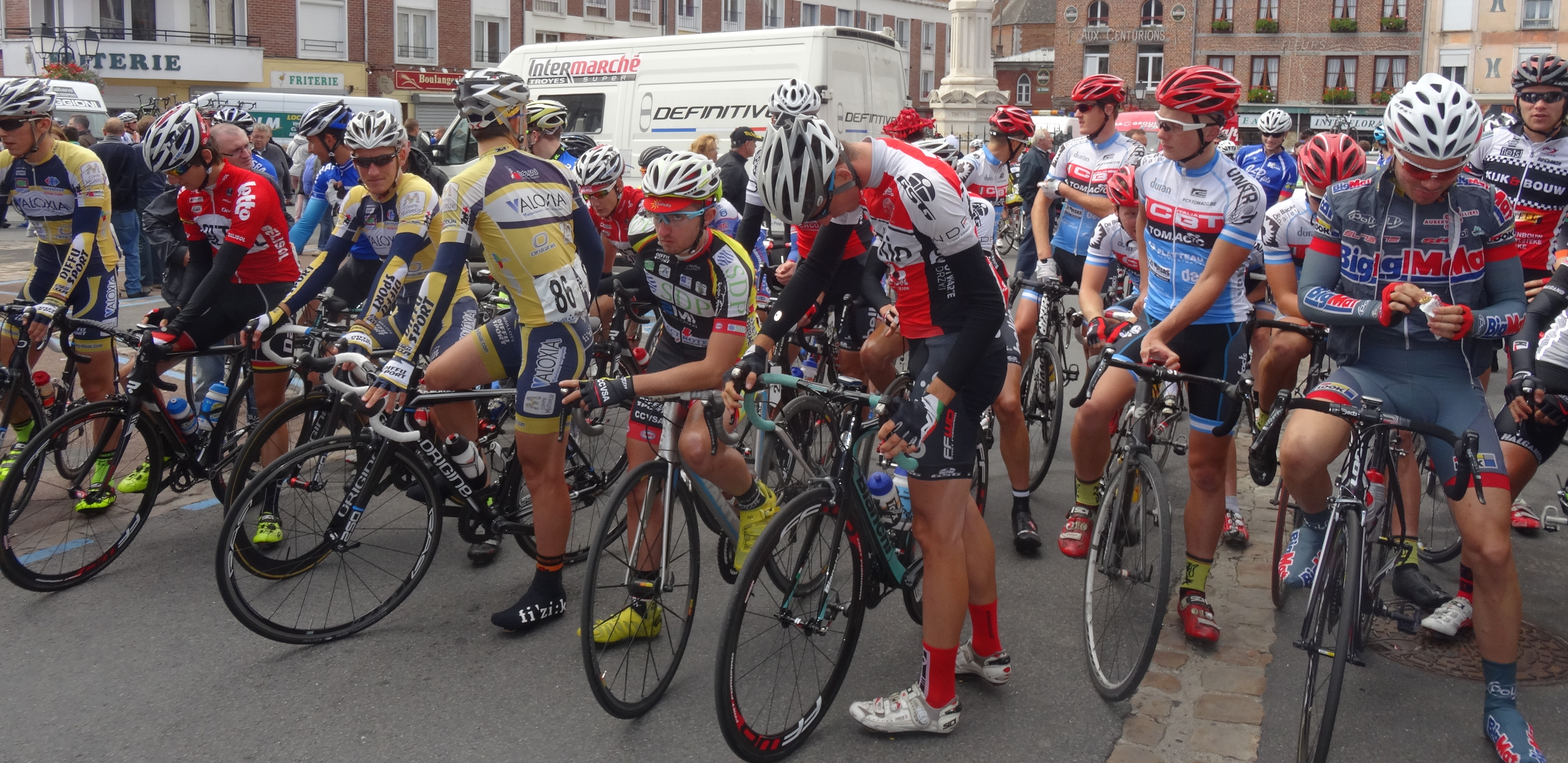 Reportage photographique réalisé le dimanche 17 août à l'occasion du départ et de l'arrivée du Grand Prix de Bavay 2014 à Bavay, Nord, Nord-Pas-de-Calais, France.